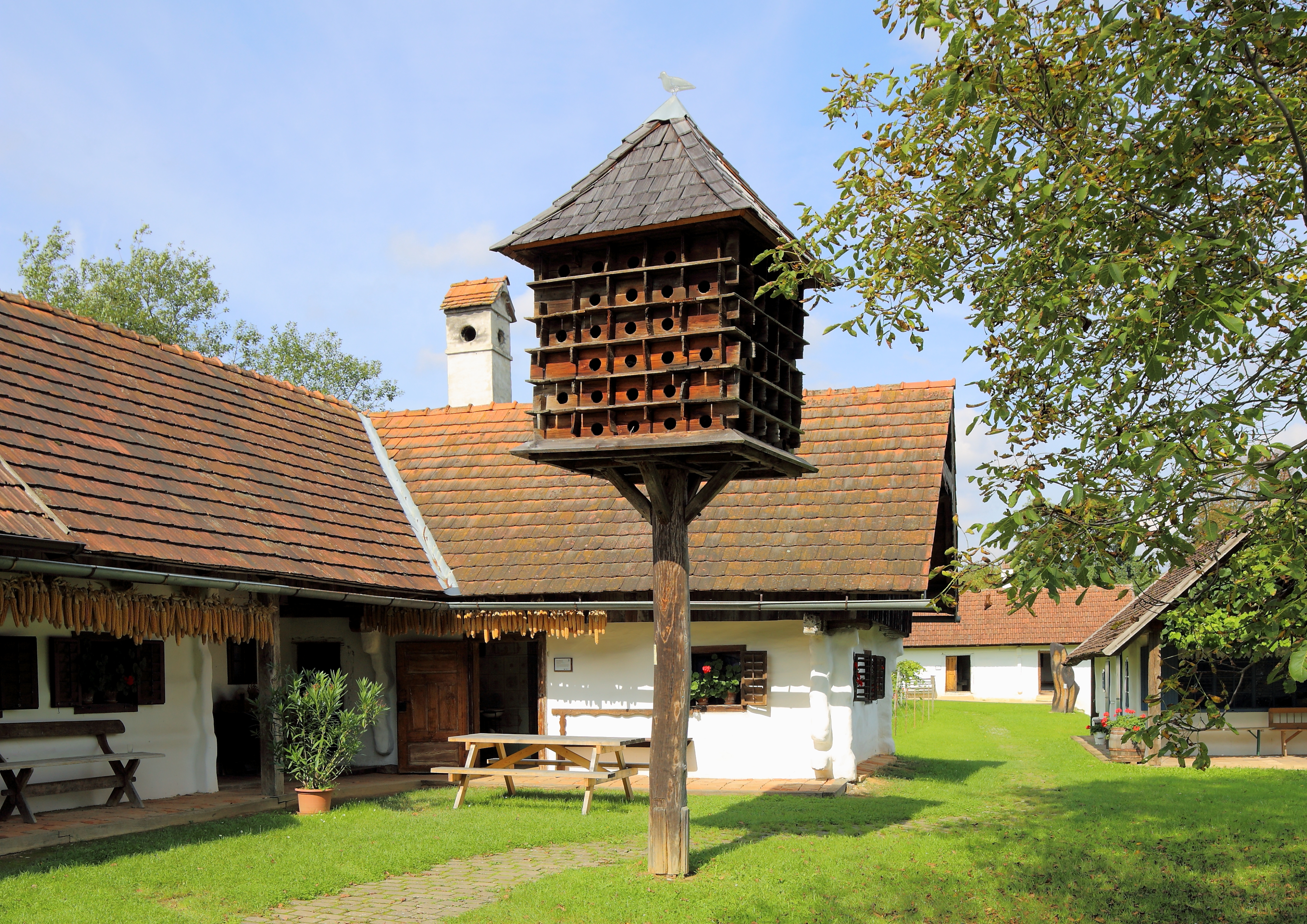 Taubenschlag im Freilichtmuseum Gerersdorf (Objektnummer 2) in der burgenländischen Gemeinde Gerersdorf-Sulz. Ein Taubenschlag für 96 Tauben(familien) aus der Mitte des 19. Jahrhunderts, der ursprünglich im Hof der Wohlrab-Mühle in Wulkaprodersdorf stand und 1995 hierher übertragen wurde. In früheren Zeiten galten gebratene oder gekochte Tauben als ein wertvolles Lebensmittel.